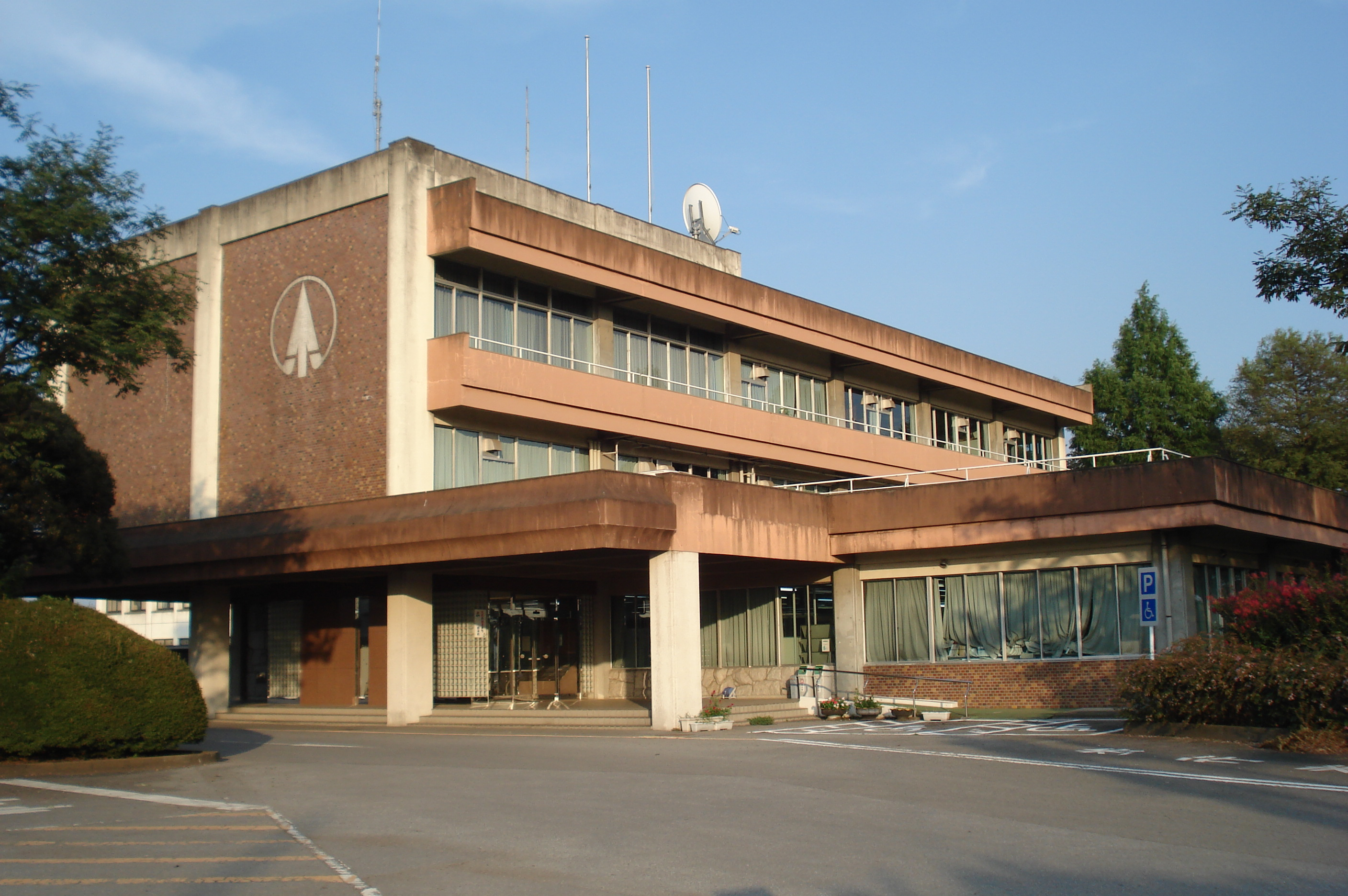 野木町役場本館 栃木県下都賀郡野木町丸林571